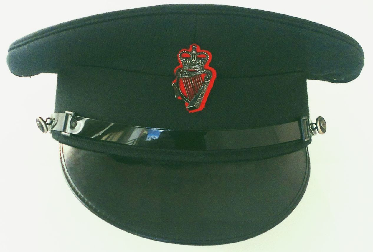 Gorra de plat del Royal Ulster Constabulary. Agents i sargents,1990.